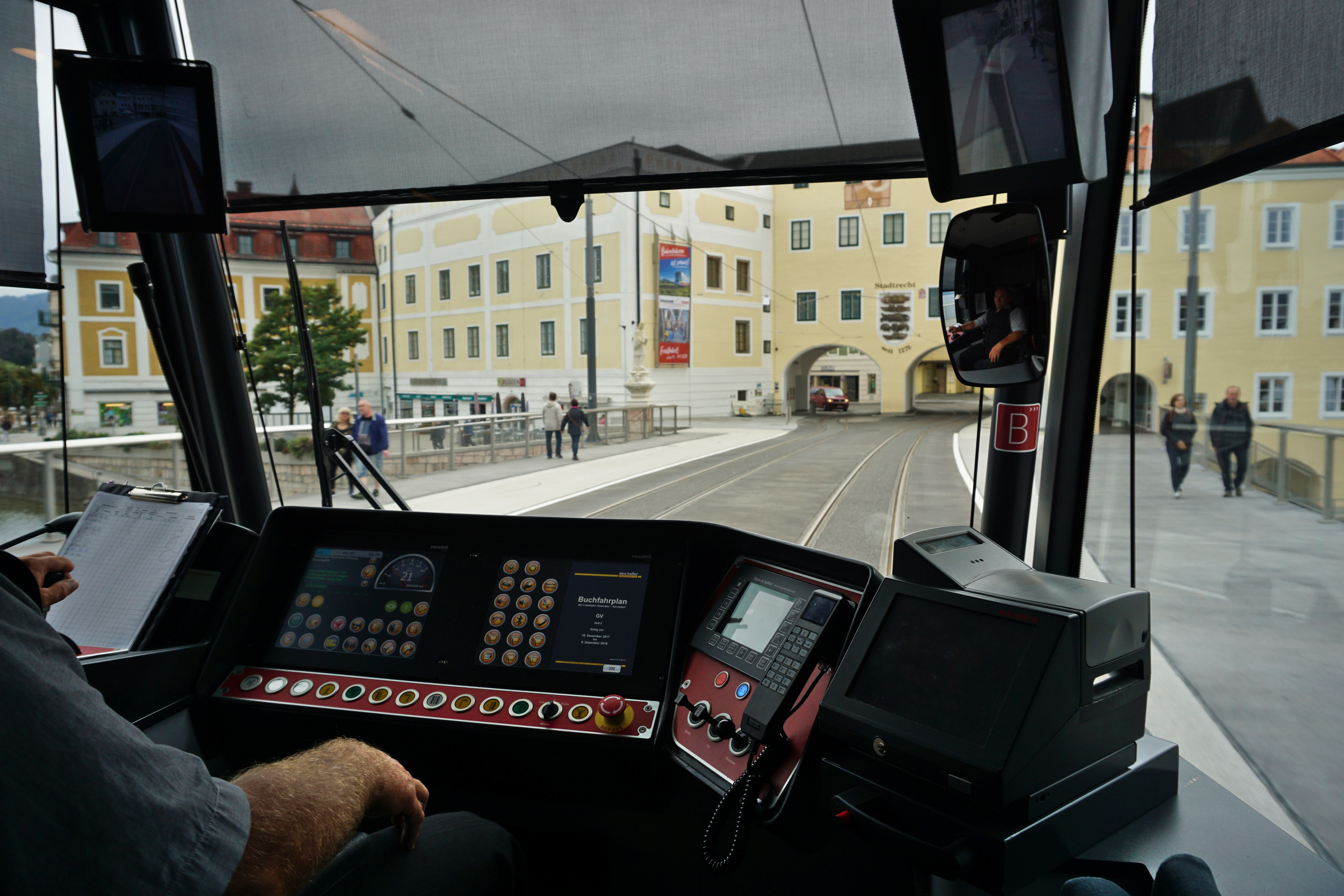 Führerstand eines Vossloh Tramlink der Traunseetram auf der Traunbrücke kurz vor der Durchfahrt durch das Trauntor